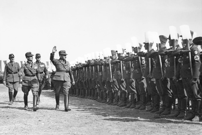 Berlin, Maifeier auf dem Tempelhofer Feld Scherl: Staatssekretär [Konstantin] Hierl schreitet auf dem Tempelhofer Feld die Front des Arbeitsdienstes ab. 1. Mai 1934 Abgebildete Personen: Hierl, Konstantin: Reichsarbeitsführer, Deutschland